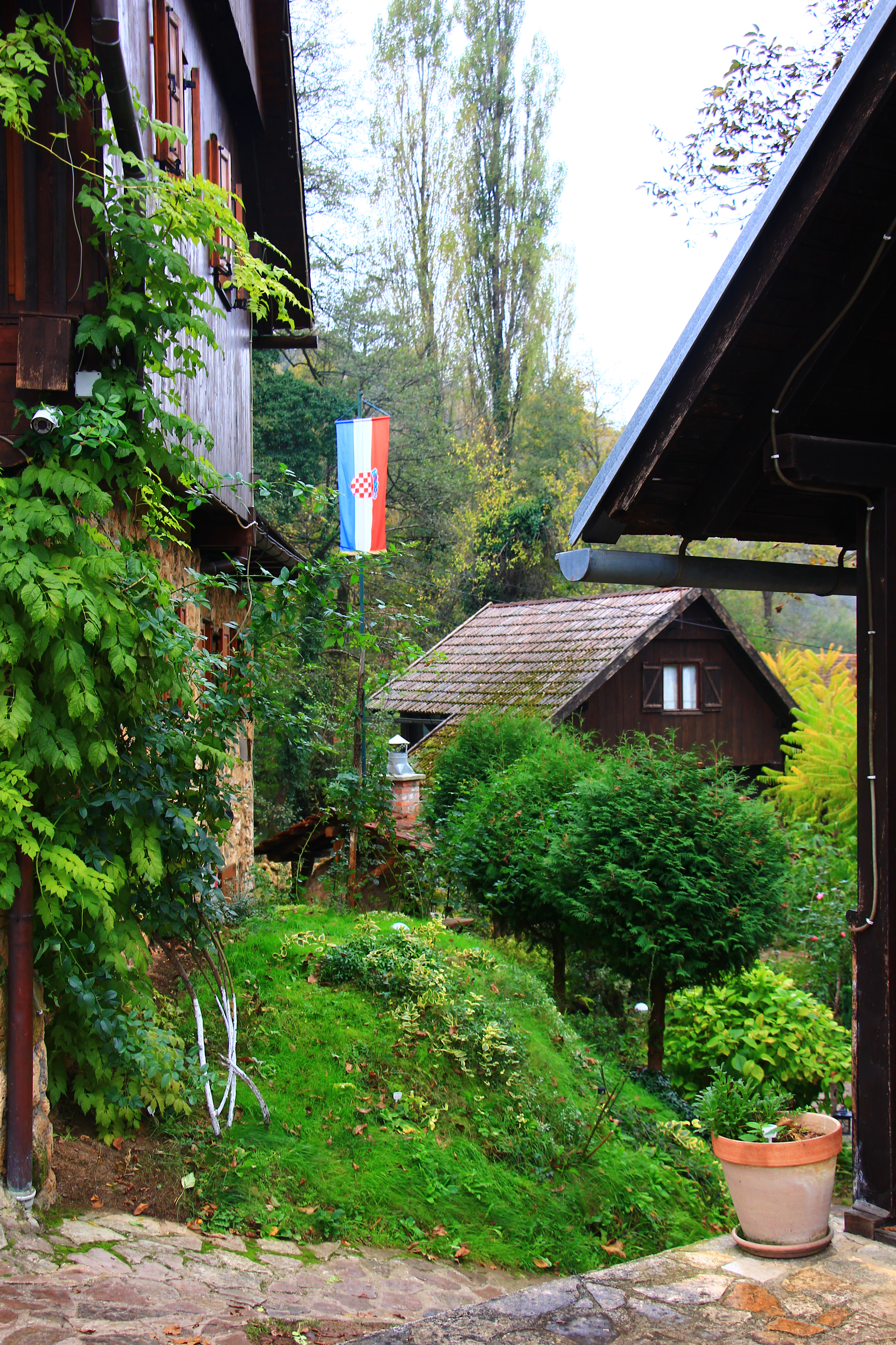 Rastoke mit seinen Wasserfälllen, Teil der Stadt Slunj in Kroatien